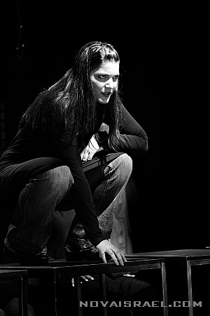 עינת ברנובסקי בהצגה הדרך לג'אנה